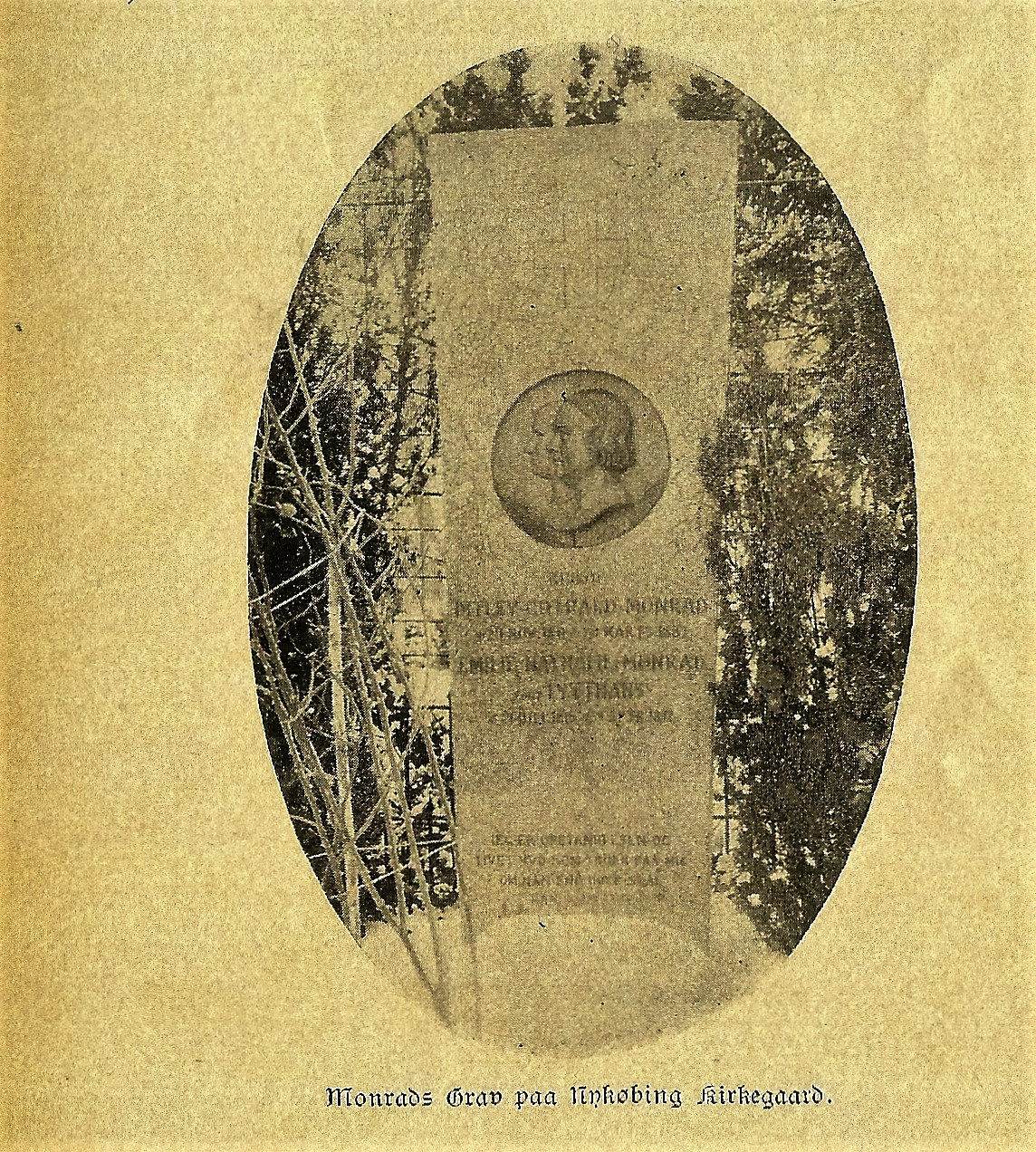 Biskop Monrads gravsted på Nykøbing Kirkegård (nu nedlagt). Kilde: Almanaken 'Lolland-Falster' 1906 (Nakskov 1905)